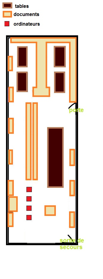 F1er lycée Havre